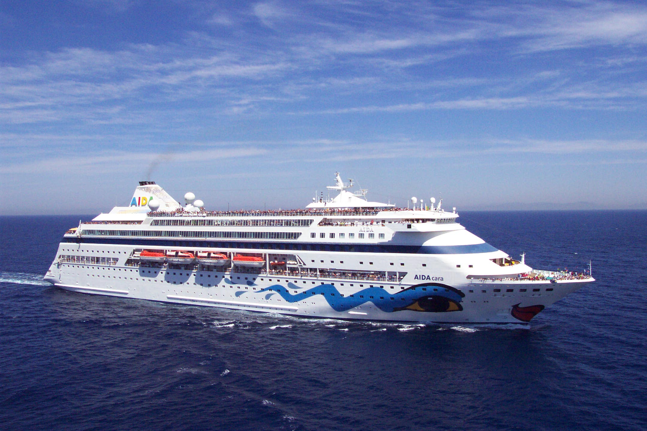 AIDAcara im Mittelmeer